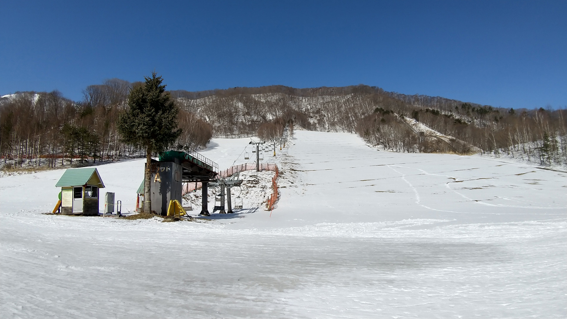 2019-2020シーズン限りで廃止となる尾瀬岩鞍スキー場第1ロマンスリフト(昭和49年設置・昭和59年架替) 2020年2月